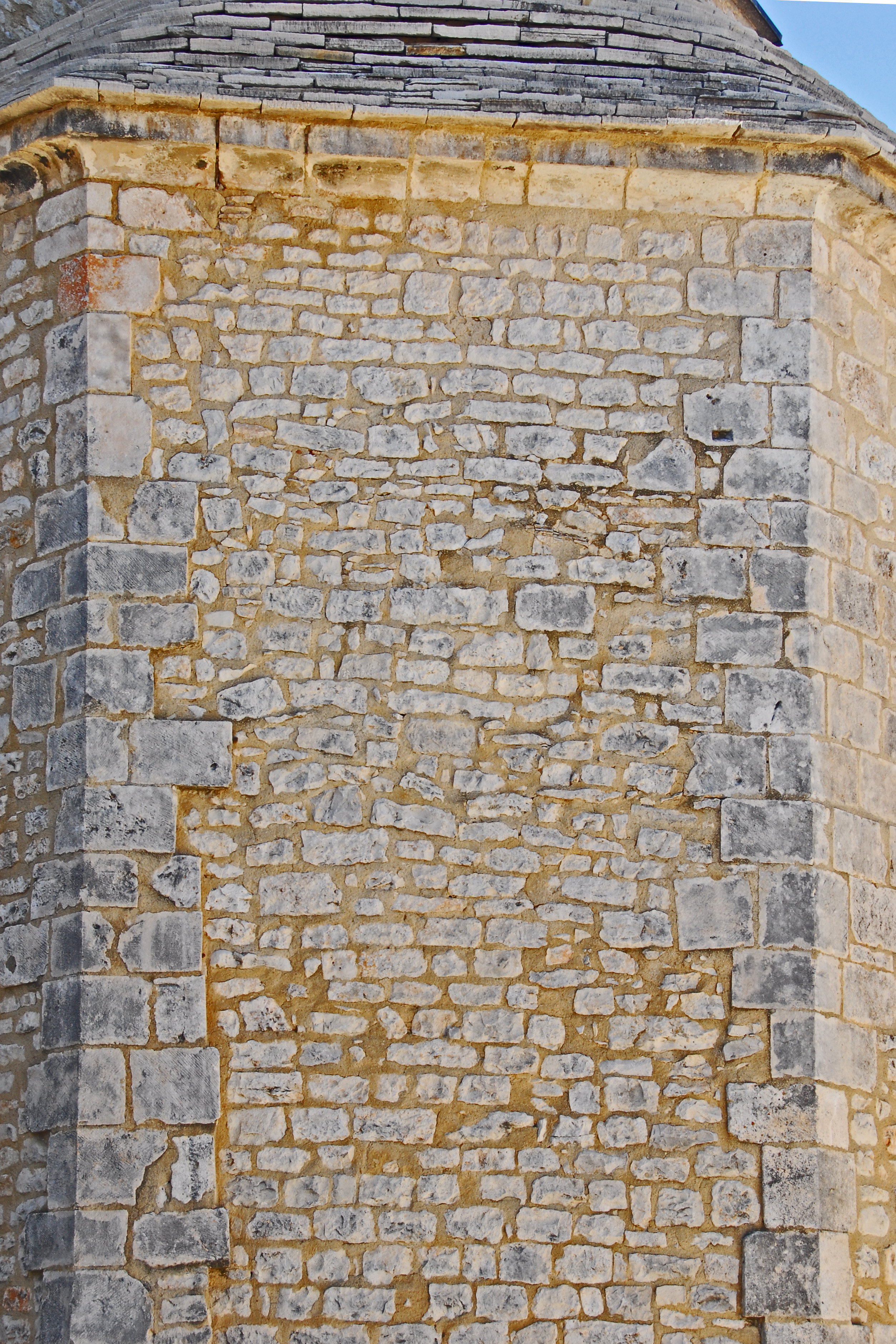 N-D et St-Christophe de St-Christol, Chorapsis Wandabschnitt